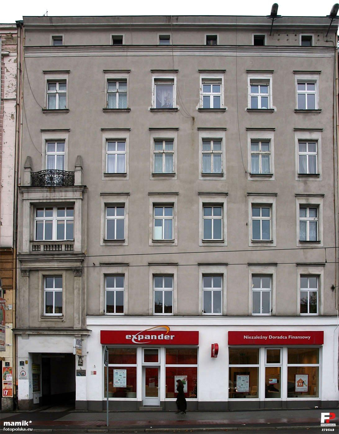 Kamienica nr 7